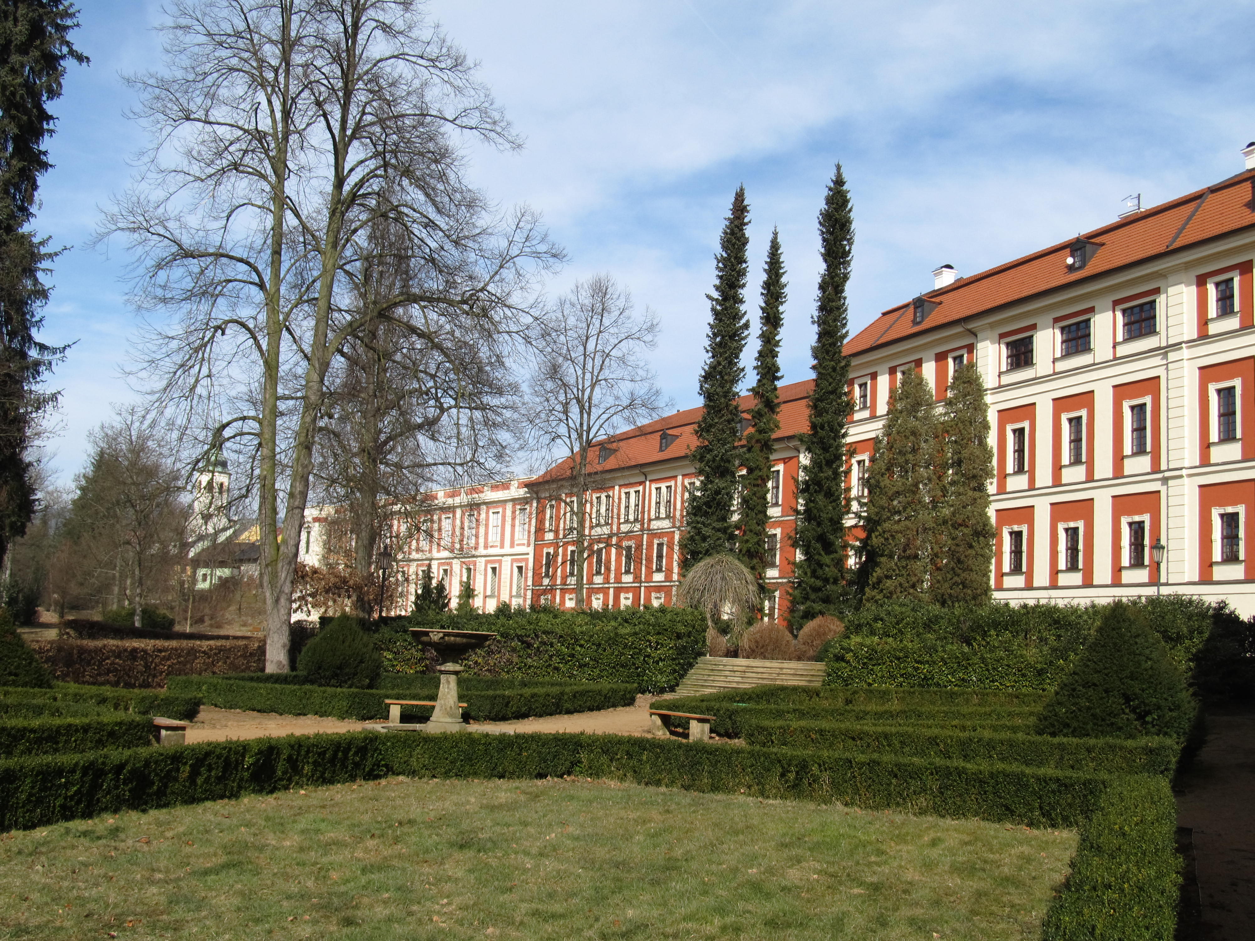 Pohled na zámek z parku